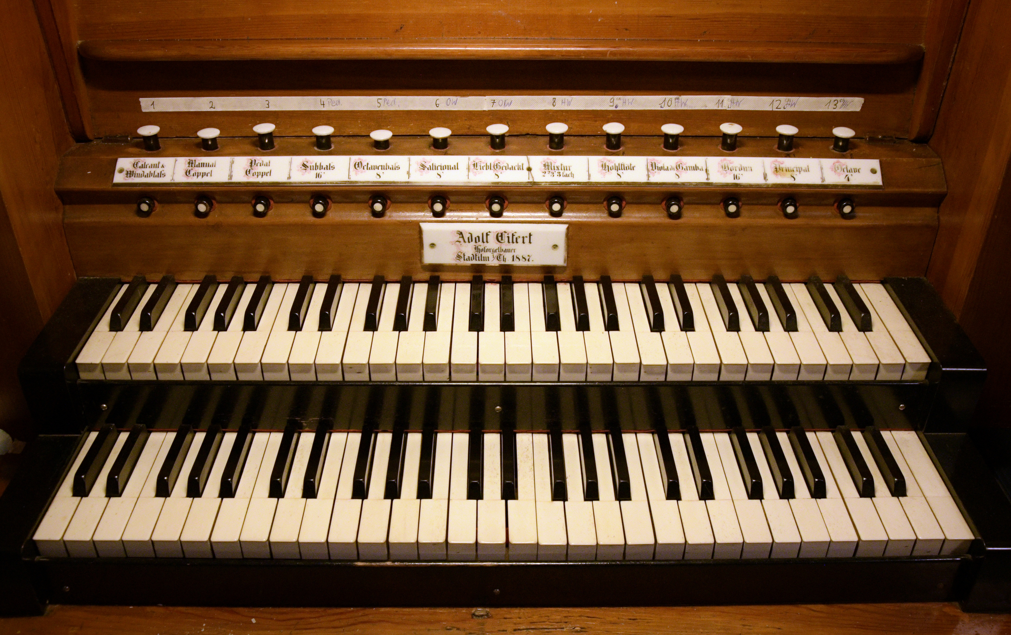 Spieltisch mit zwei Manualen der Eifert-Orgel in der Kirche von Ilmenau-Roda, erbaut im Jahre 1887 durch den Orgelbauer Ad. Eifert, Stadtilm.